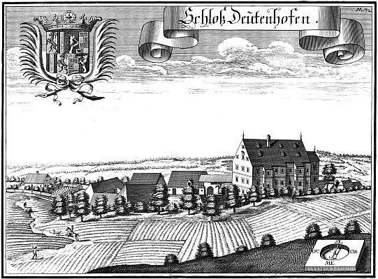 Schloss Deutenhofen; Kupferstich von Michael Wening